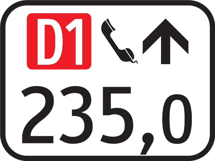 IS 32 - Kilometrovník (diaľnica, s telefónom)